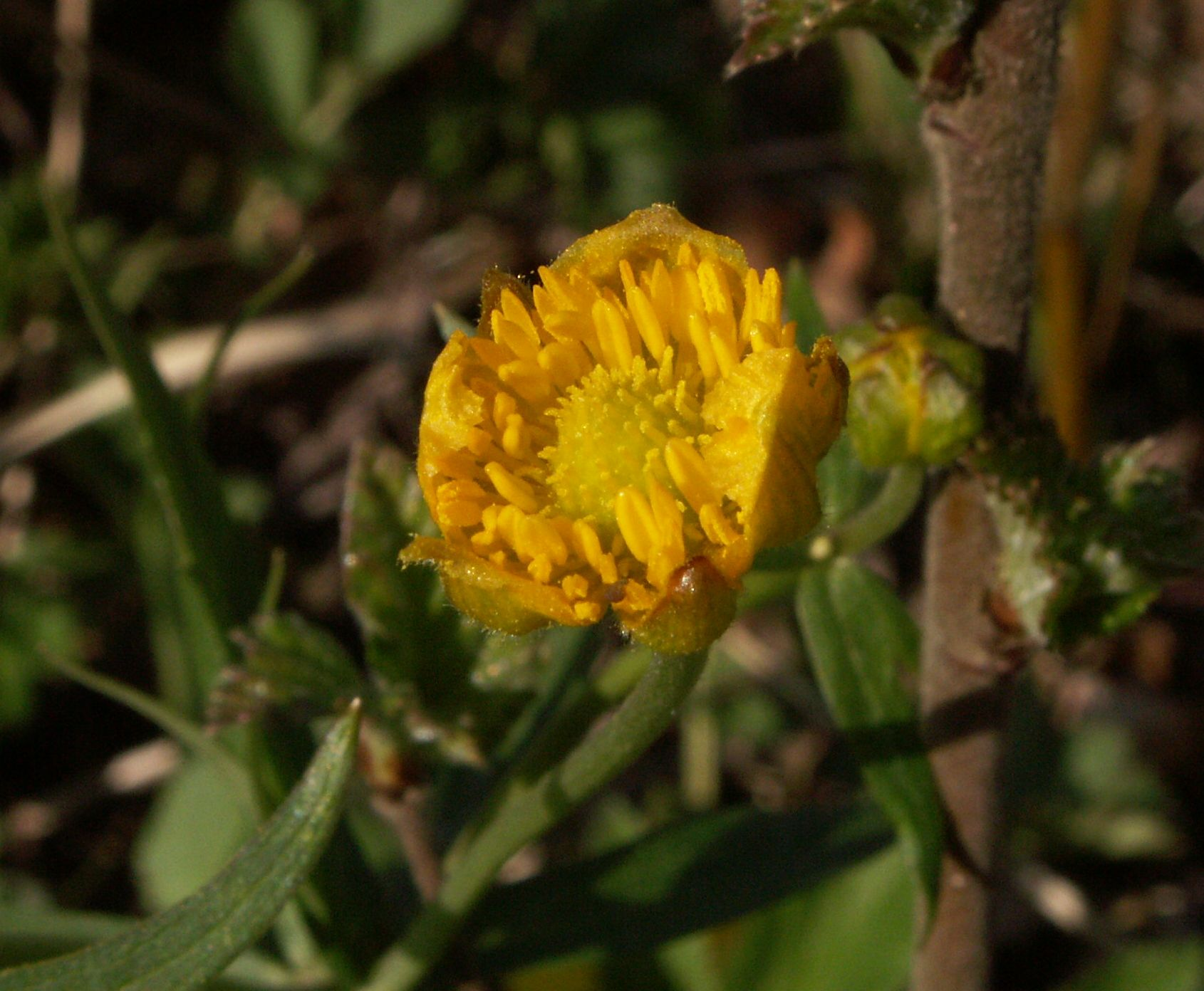 ranunculus cassubicus, flower